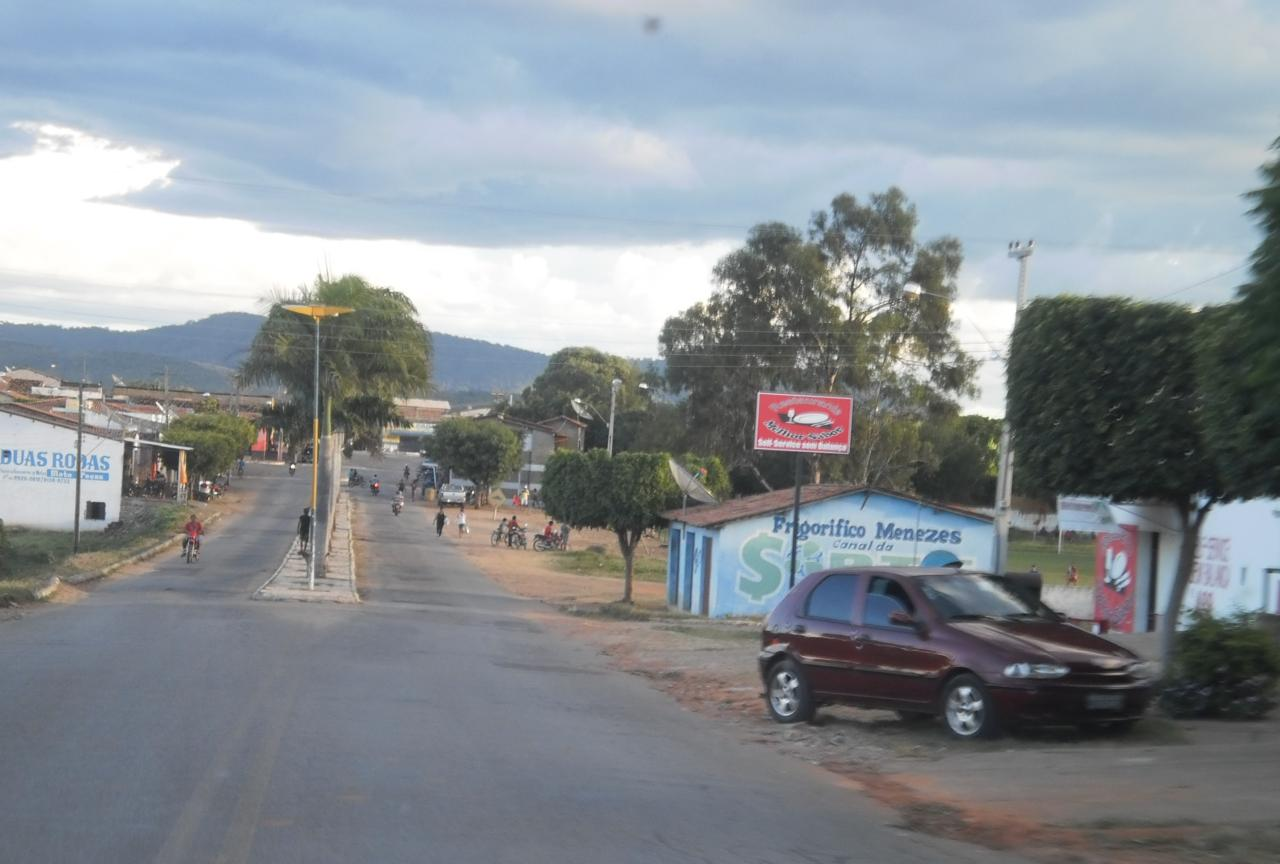 Município de Cachoeira dos Índios, estado da Paraíba, Brasil.